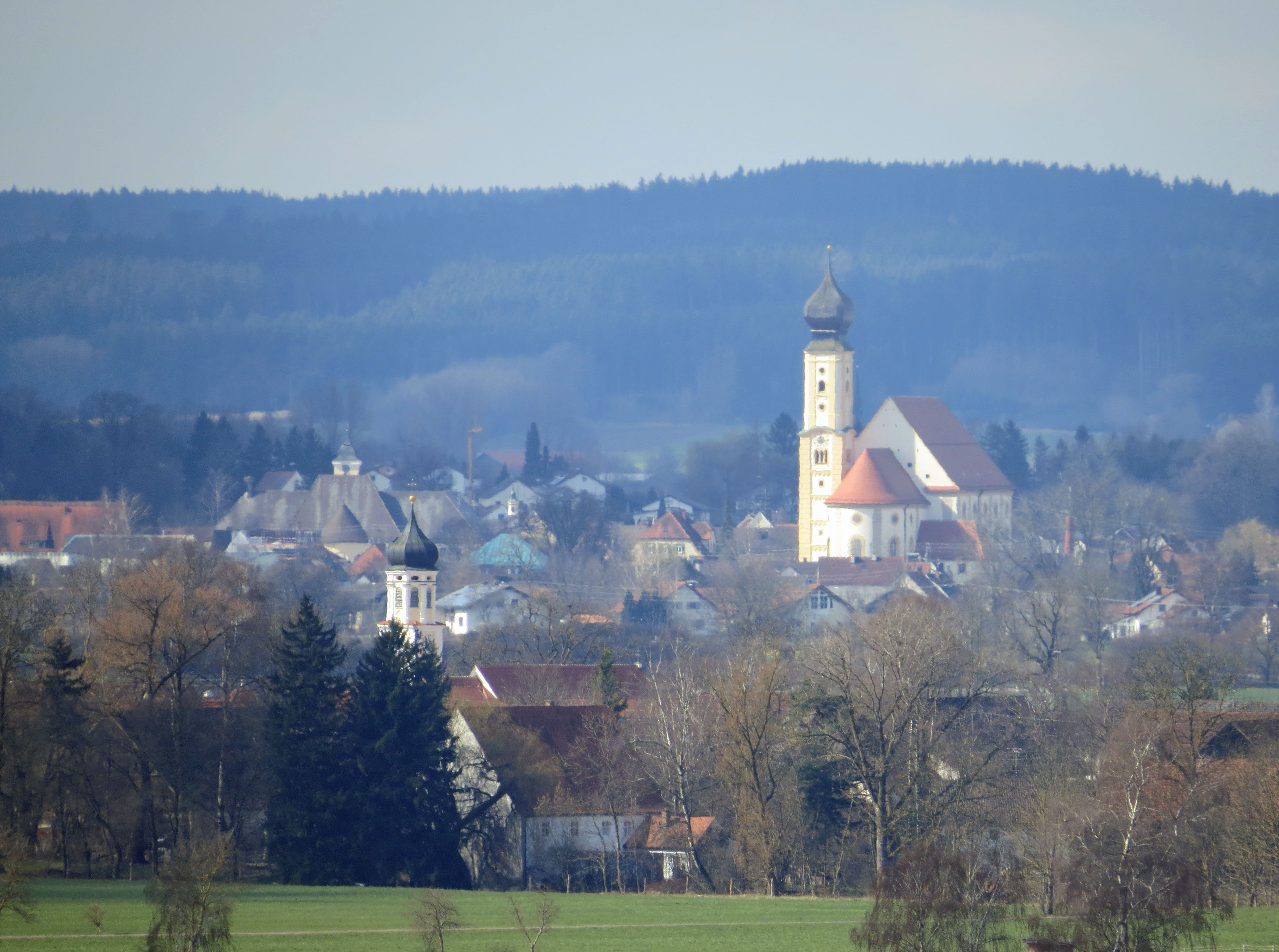 Salgen und Pfaffenhausen von Nordosten